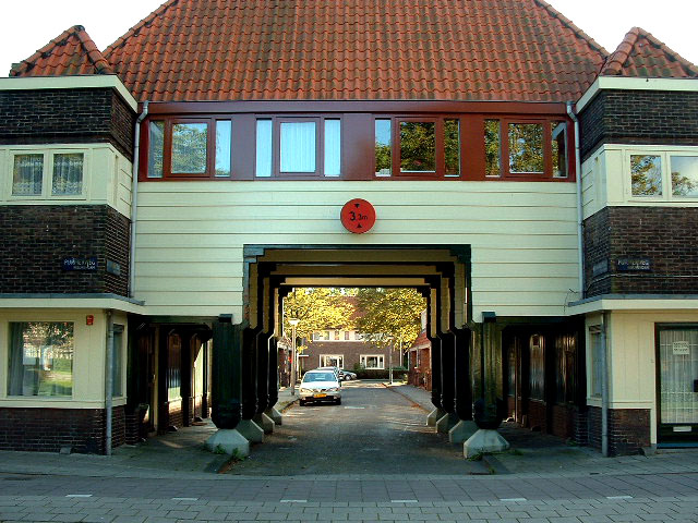 Tuindorp Nieuwendam. Poortwoningen Purmerplein. Doorkijk.